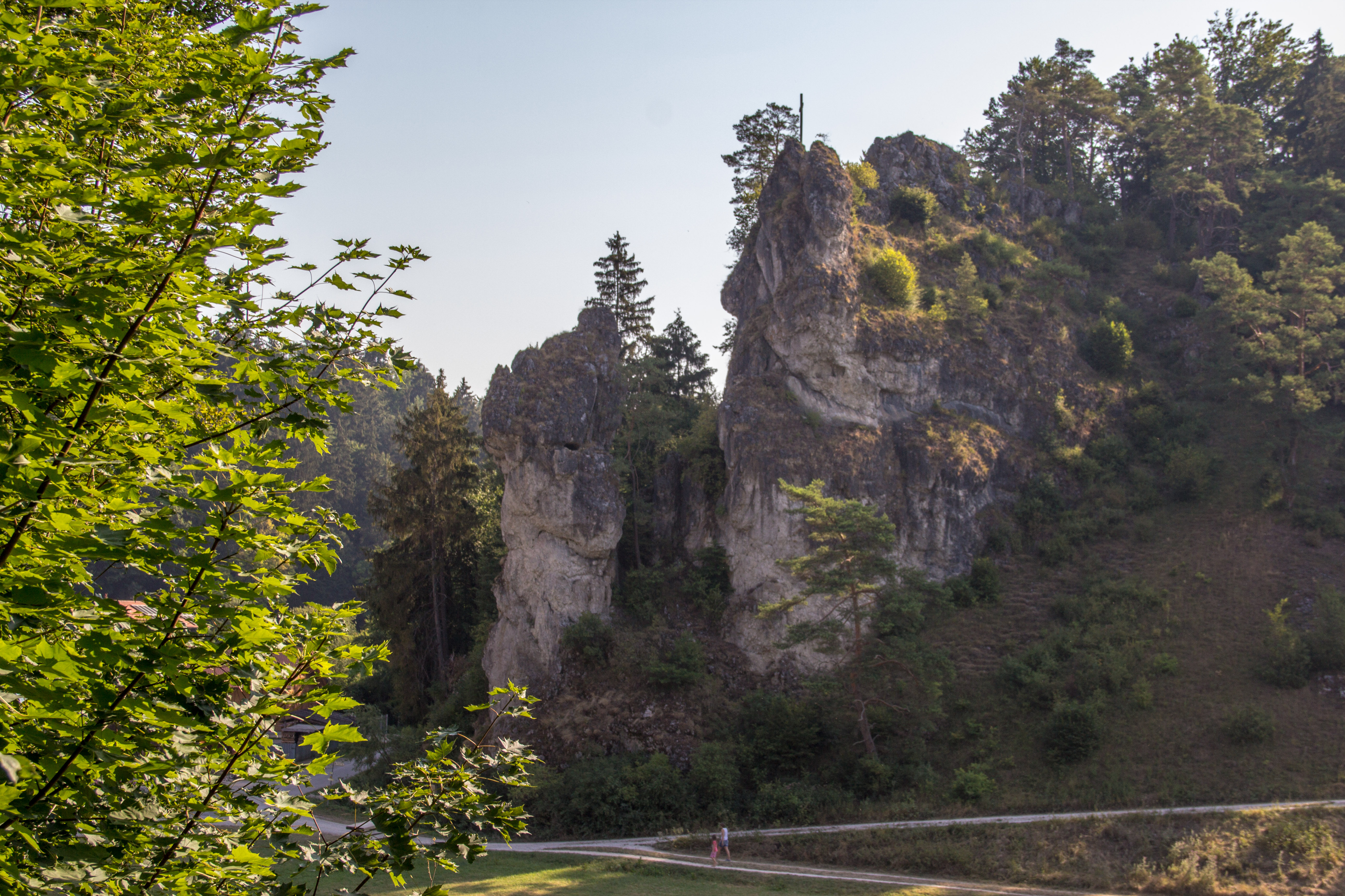 Bachhaupter Felsen, Bachhaupten, Breitenbrunn